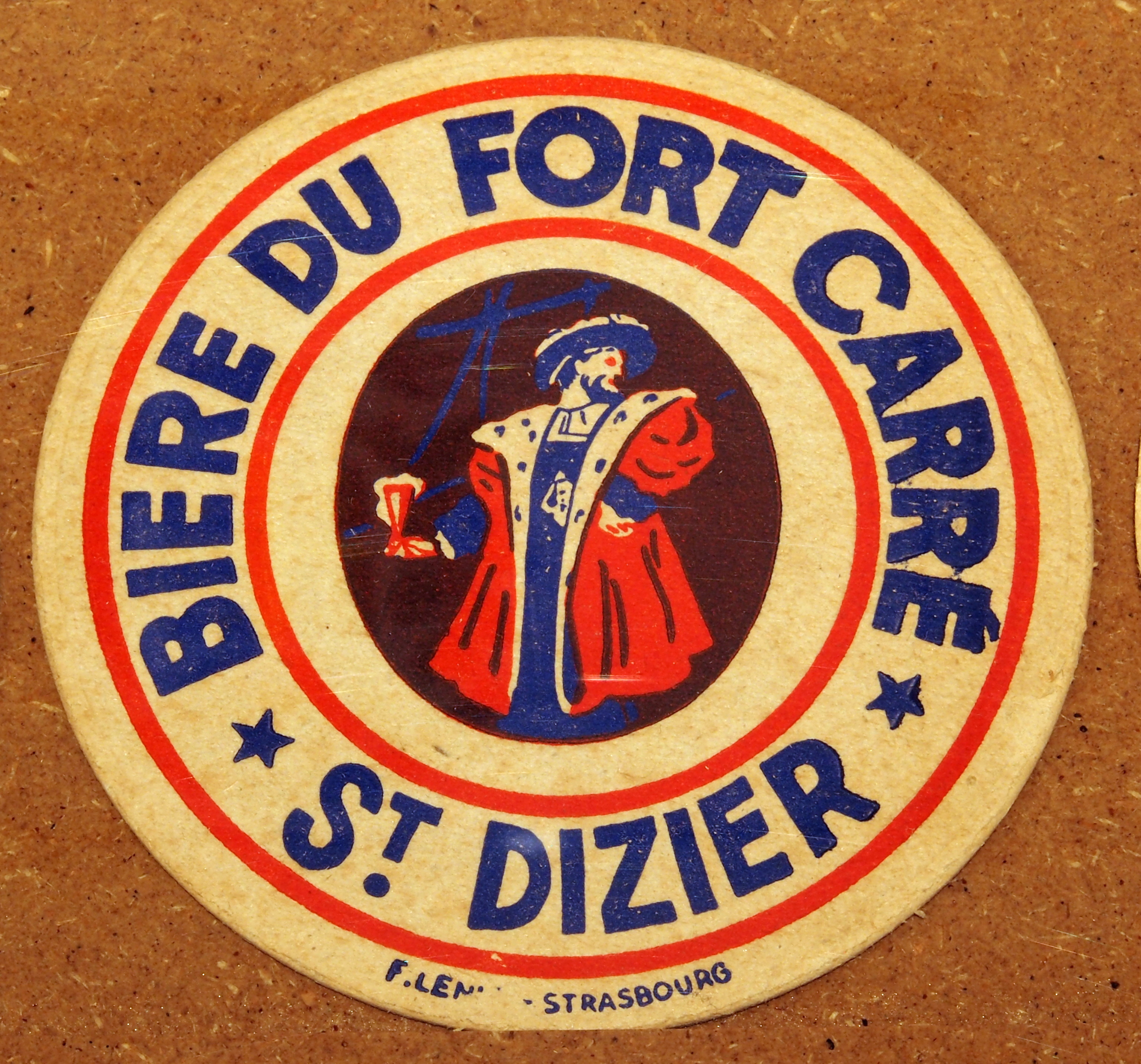 Bière du Fort Carré St. Dizier. (Photographed through glass.)